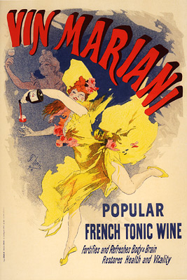 Vin Mariani advertisement